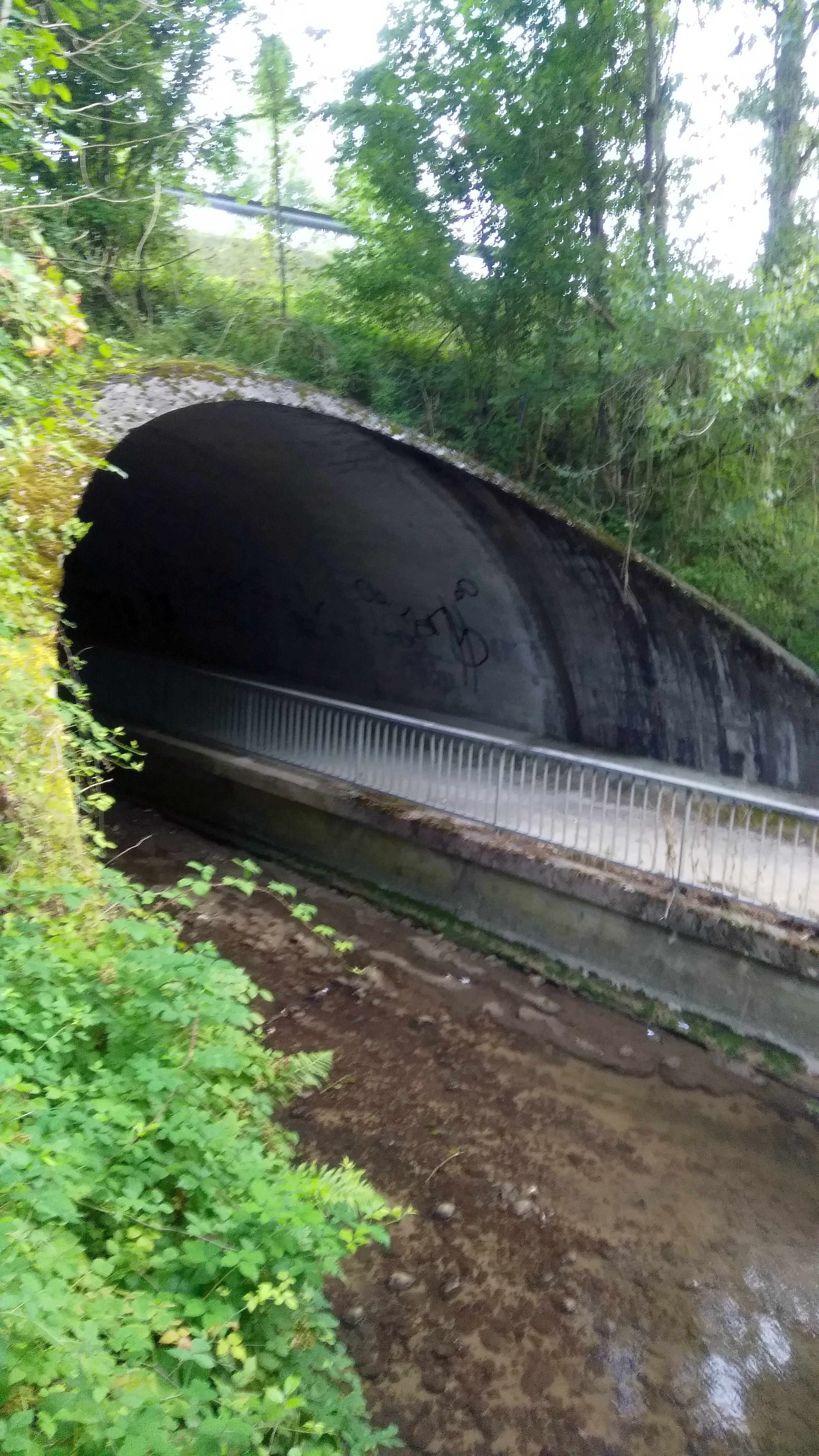 La Leysse de Novalaise: passage souterrain Autoroute A43